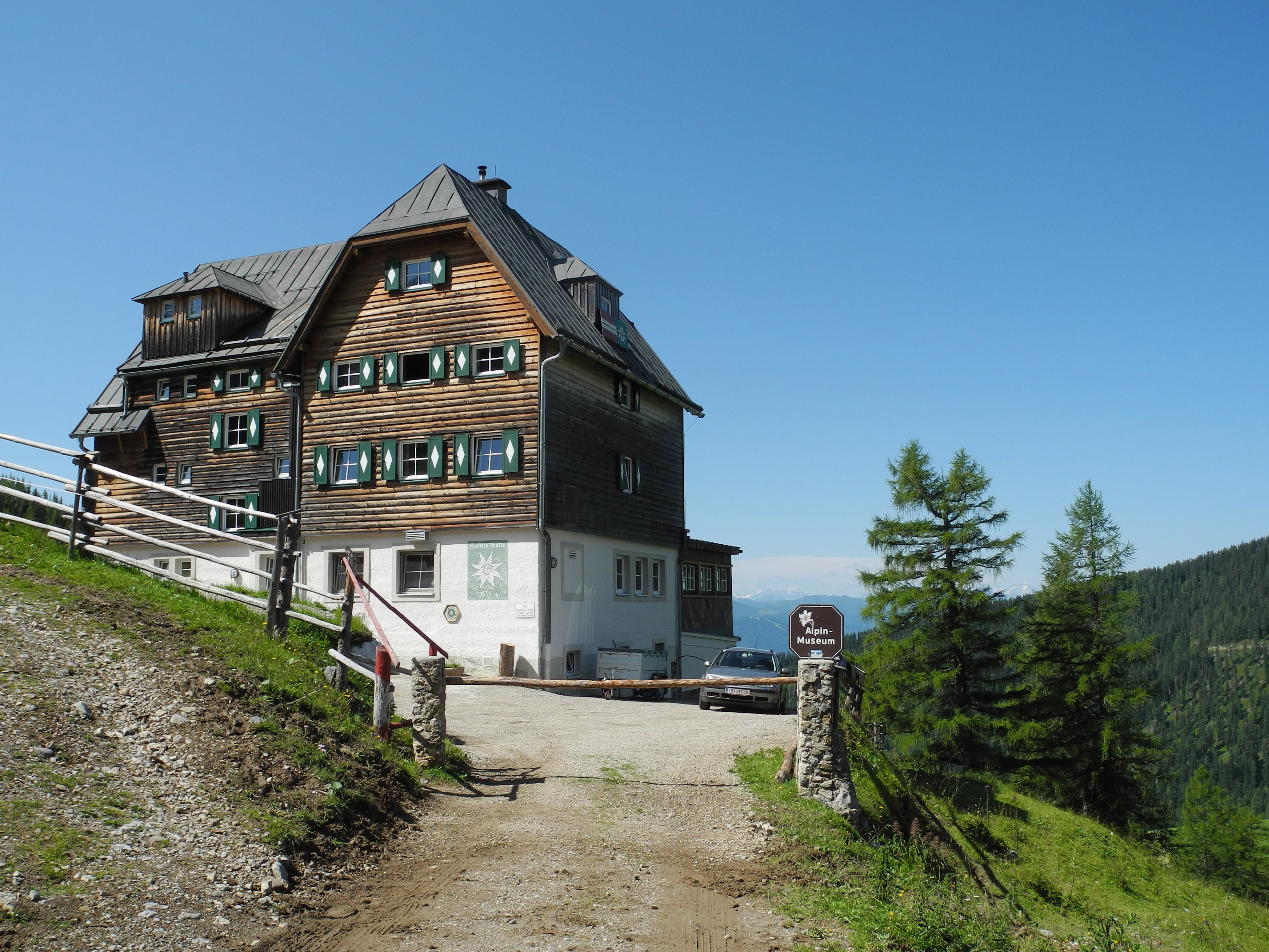 Austriahütte (1638 m) unterhalb des Dachsteinmassivs